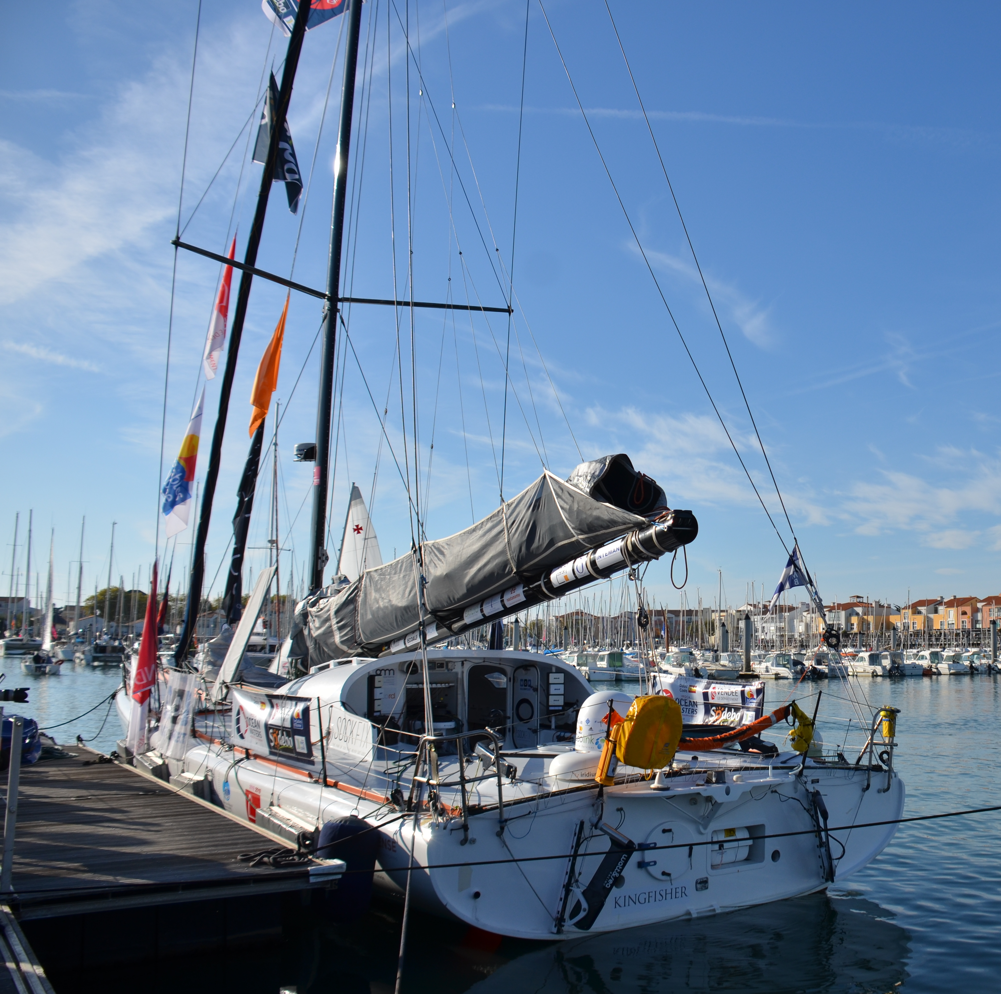 One planet One océan